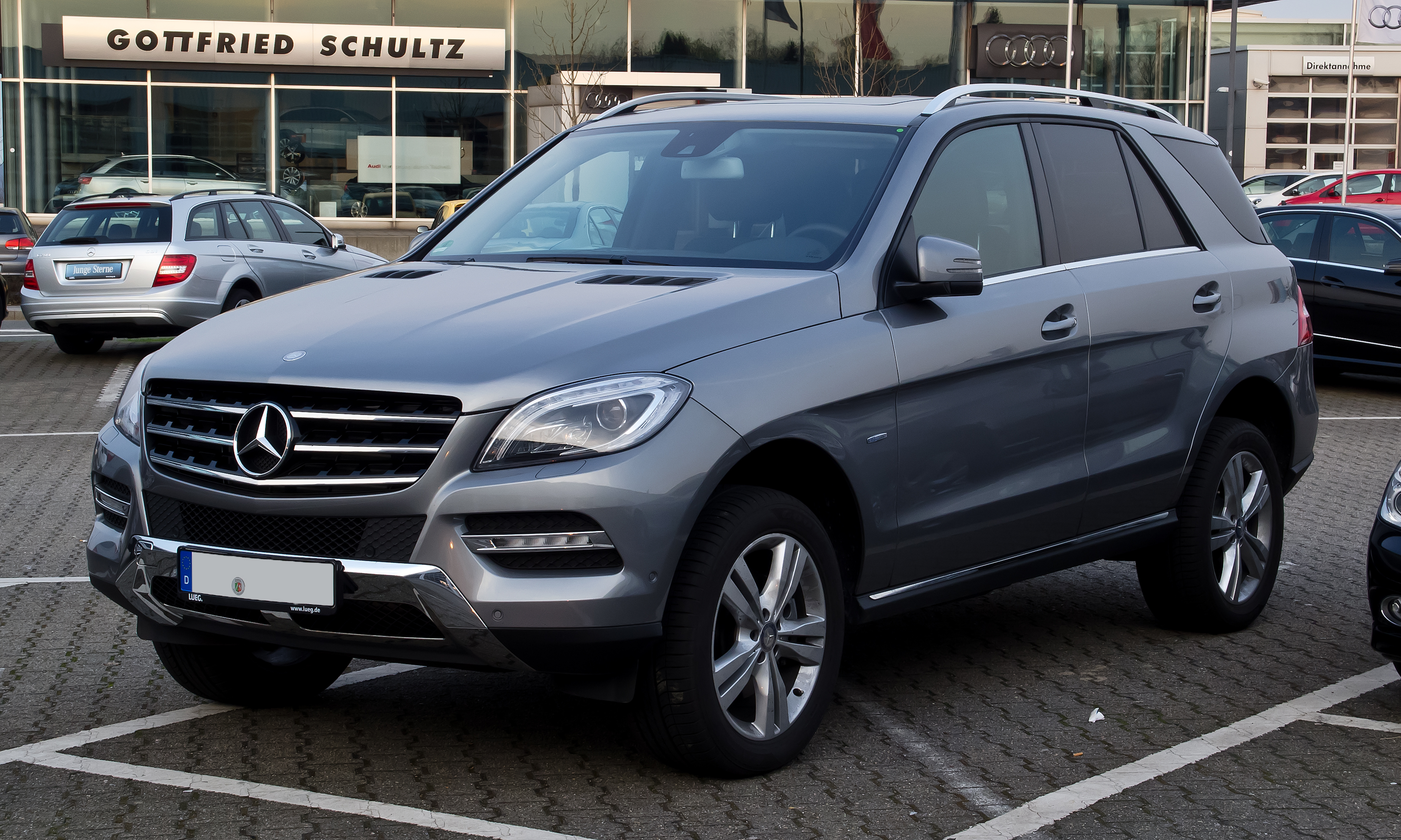 Mercedes-Benz ML 250 BlueTEC 4MATIC (W 166)